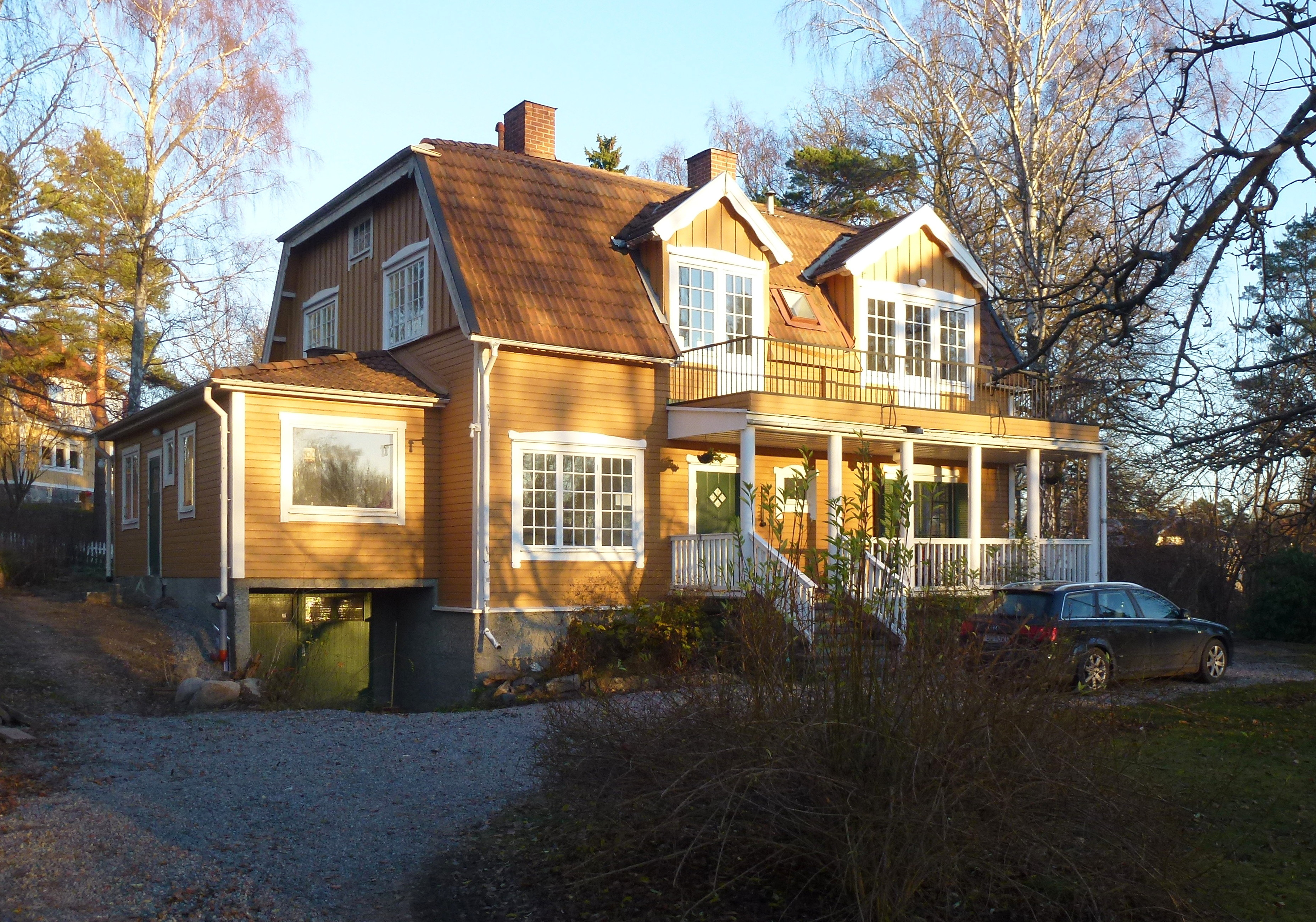 Villa Gullvivan även Villa Lodén, John Lodéns väg 15, arkitekt okänd